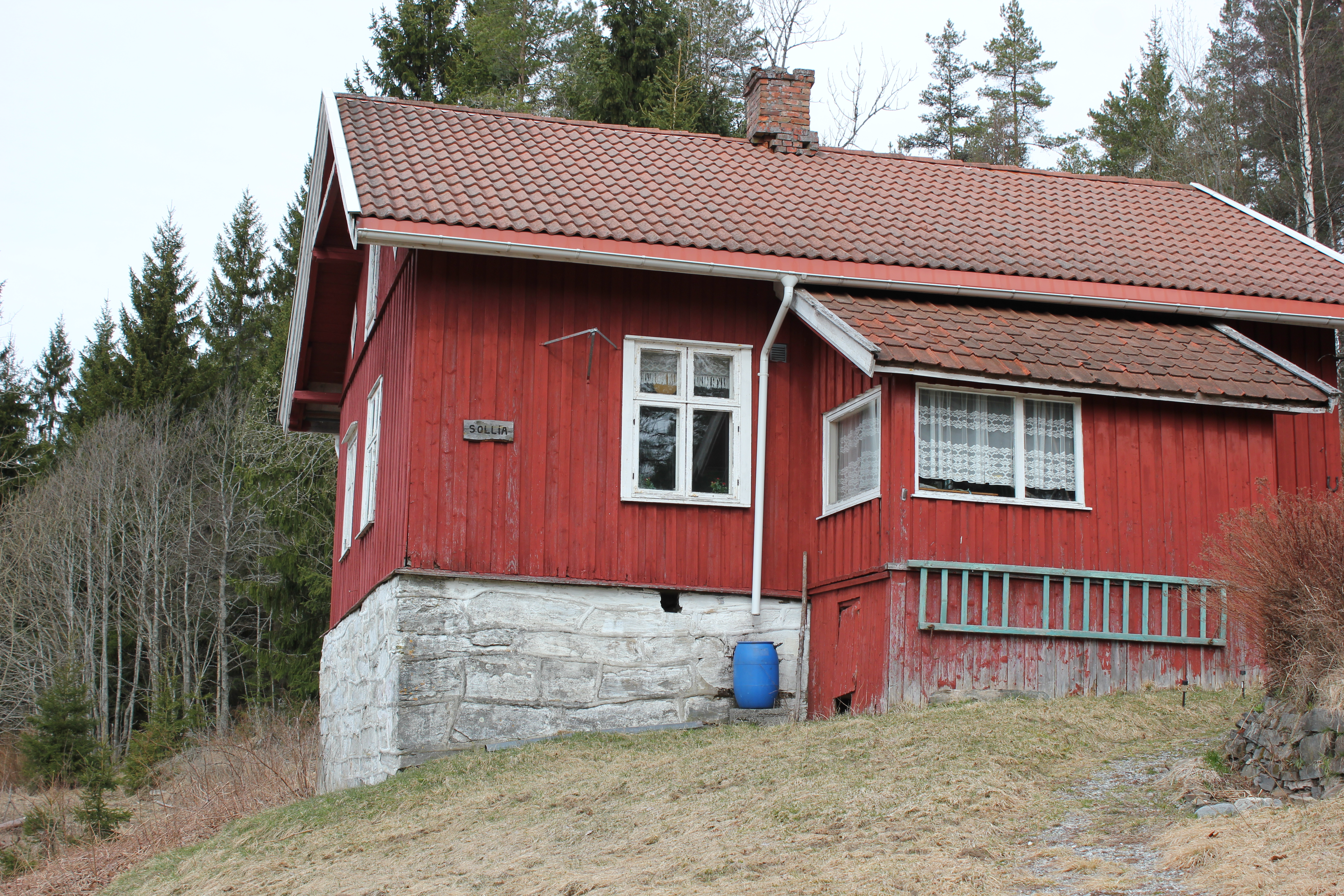 Plassen Sollia i Enebakk ligger langs flyktningeruta fra Oslo til svenskegrensen. Under andre verdenskrig var den Milorg-base, med kodenavn Hector II